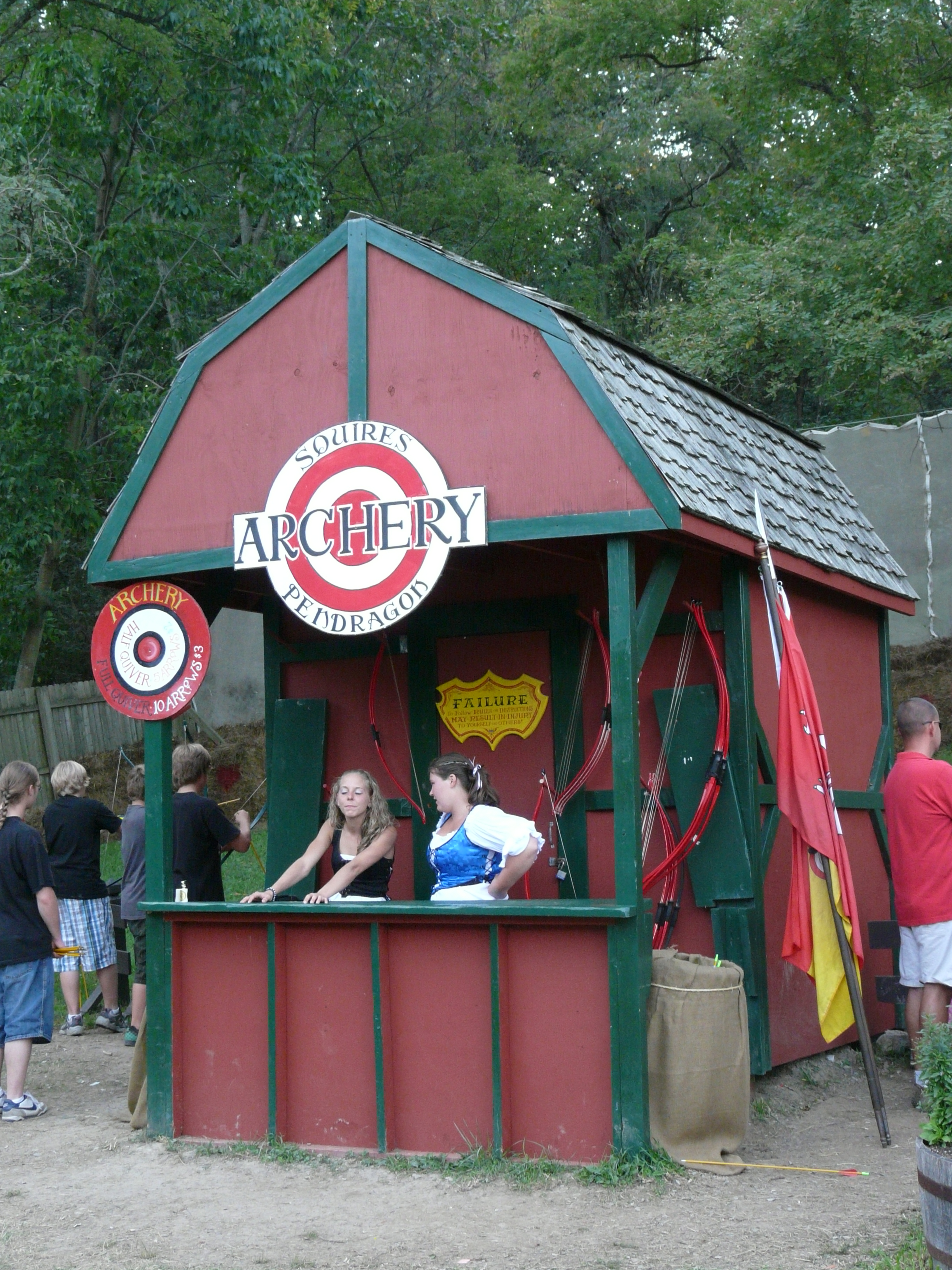 Renaissance fair near Pittsburgh